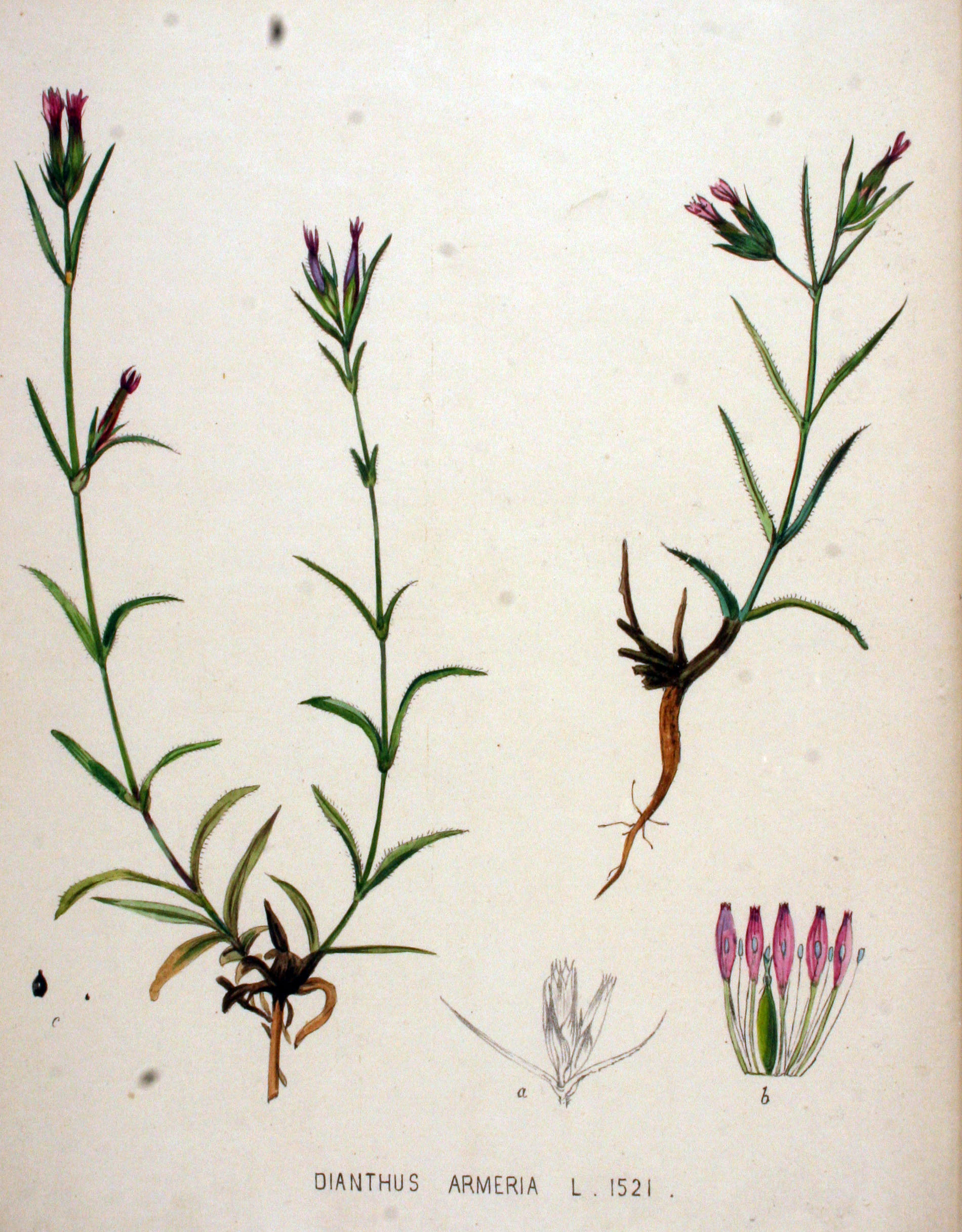 Dianthus armeria